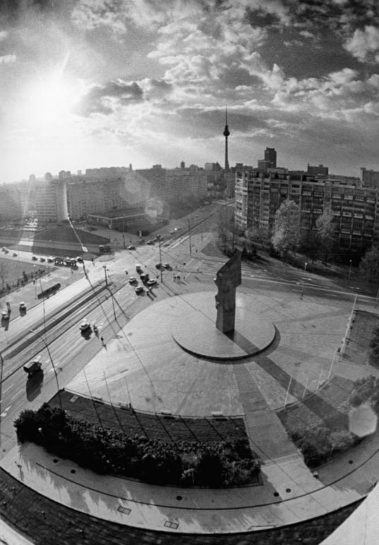 Berlin, Leninplatz ADN-ZB Roeske 4.11.88 Berlin: Der Leninplatz mit seinen s-förmig geschungenen elfgeschossigen Wohnhäuser, dem dreifach gestuften Hochhaus und dem von Nikolai Tomski aus rotem ukrainischen Granit geschaffenen Lenin-Denkmal in der Mitte ist ein markanter Platz nahe dem Zentrum der Hauptstadt. Am 7. November 1968 wurde der Grundstein für diesen Komplex mit seinen 1.250 Wohnungen gelegt.